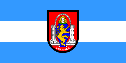 Vlag van Vukovar.